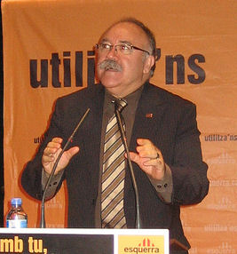 Josep-Lluís Carod-Rovira